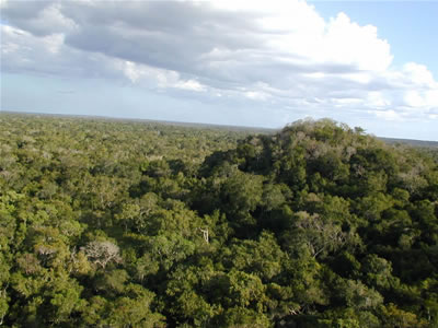 Piramide del Tigre la segunda mayor del Mirador, cubierta de Selva virgen, 2005